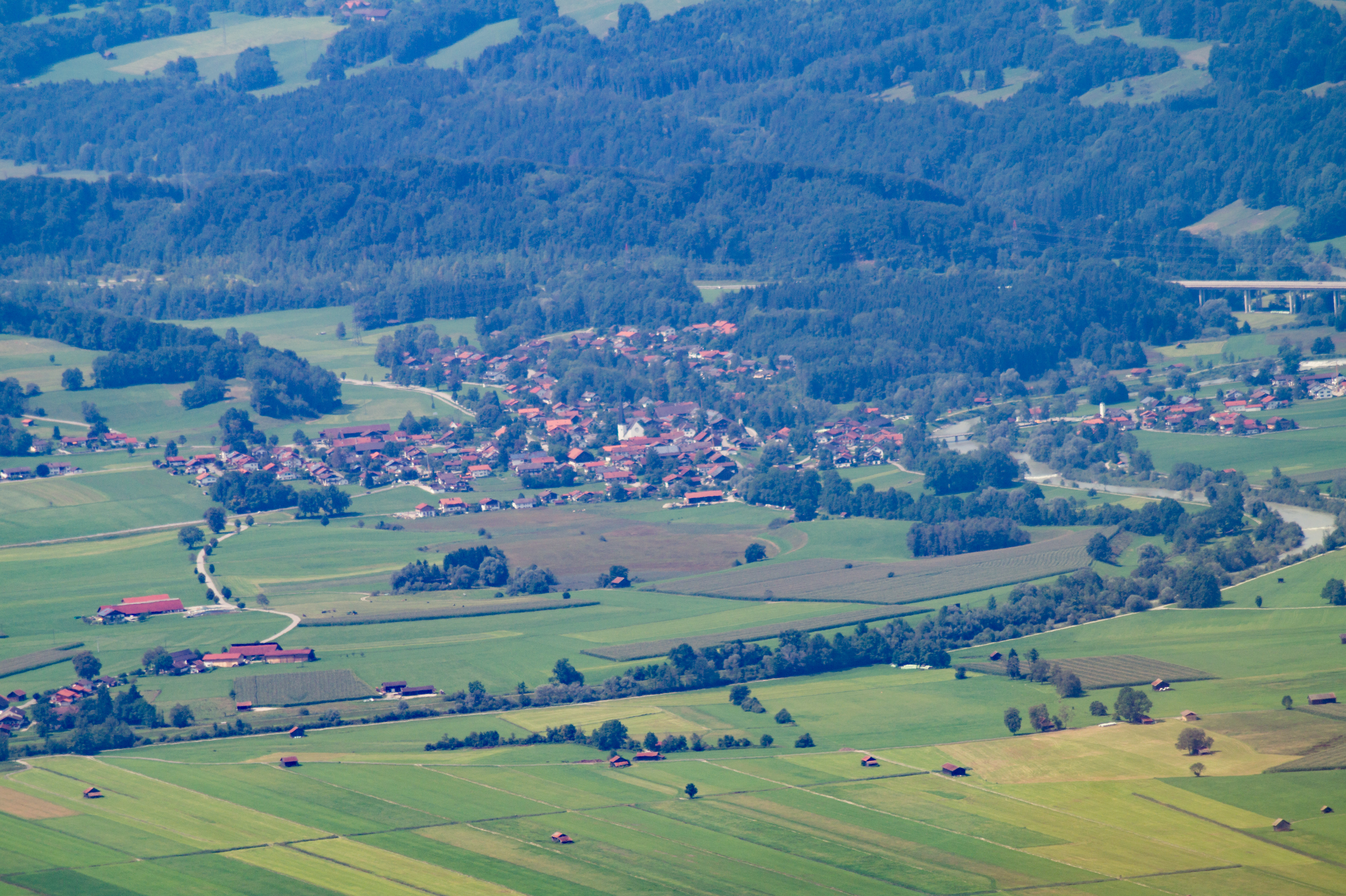 Blick vom Gipfel der Benediktenwand auf Großweil.